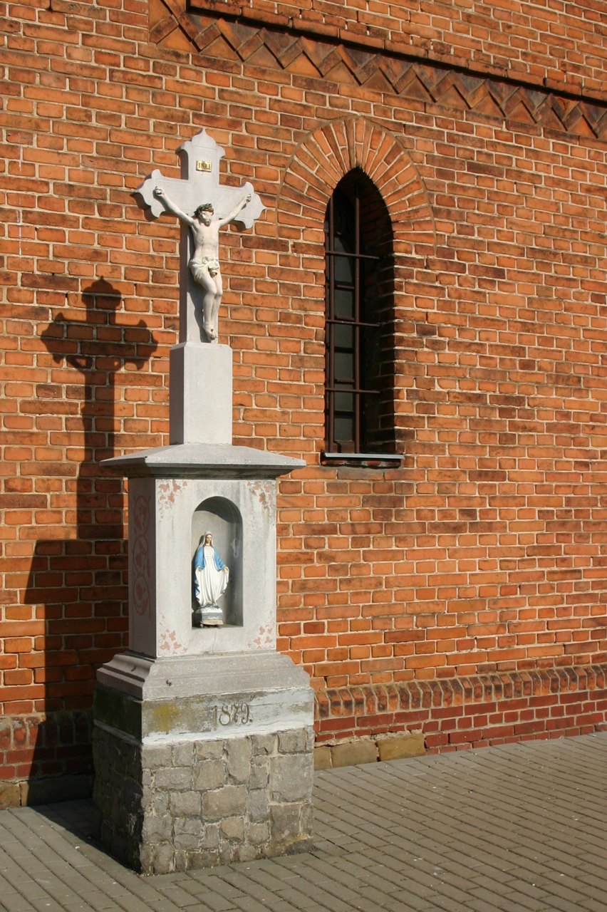 Wróblin - rzymskokatolicki kościół parafialny pw. św. Michała Archanioła, 1855.